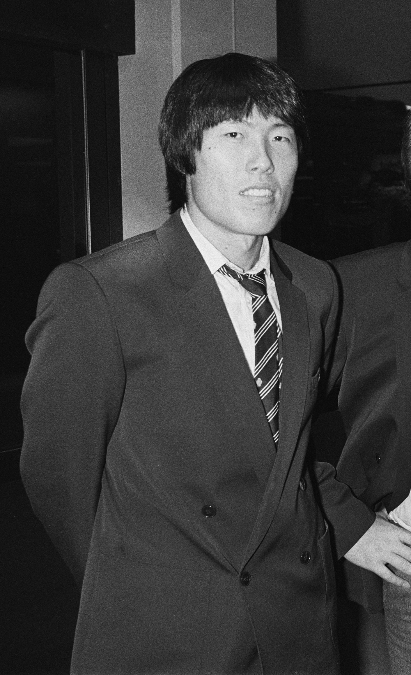 Cha Bum Kun in Nederland voor de wedstrijd tussen Feyenoord en Eintracht Frankfurt